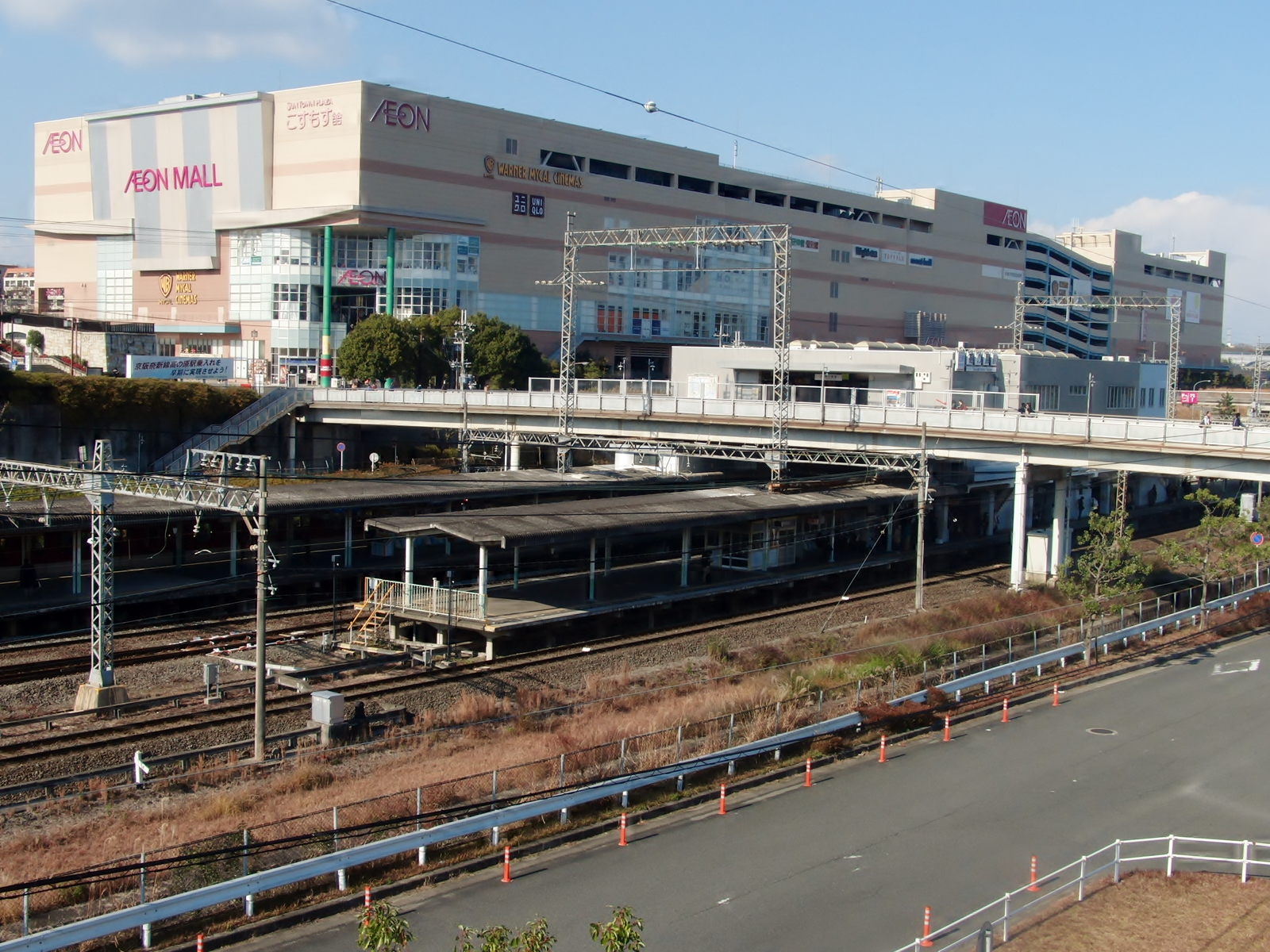 サンタウンプラザこすもす館（イオンモール高の原）を撮影